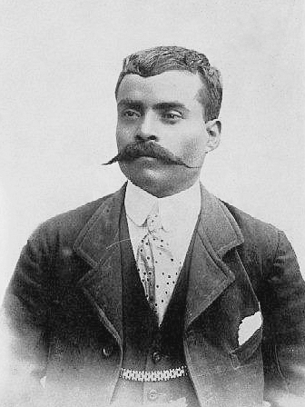 Général Emiliano Zapata - 1914 licence : probablement domaine public auteur : photographe inconnu